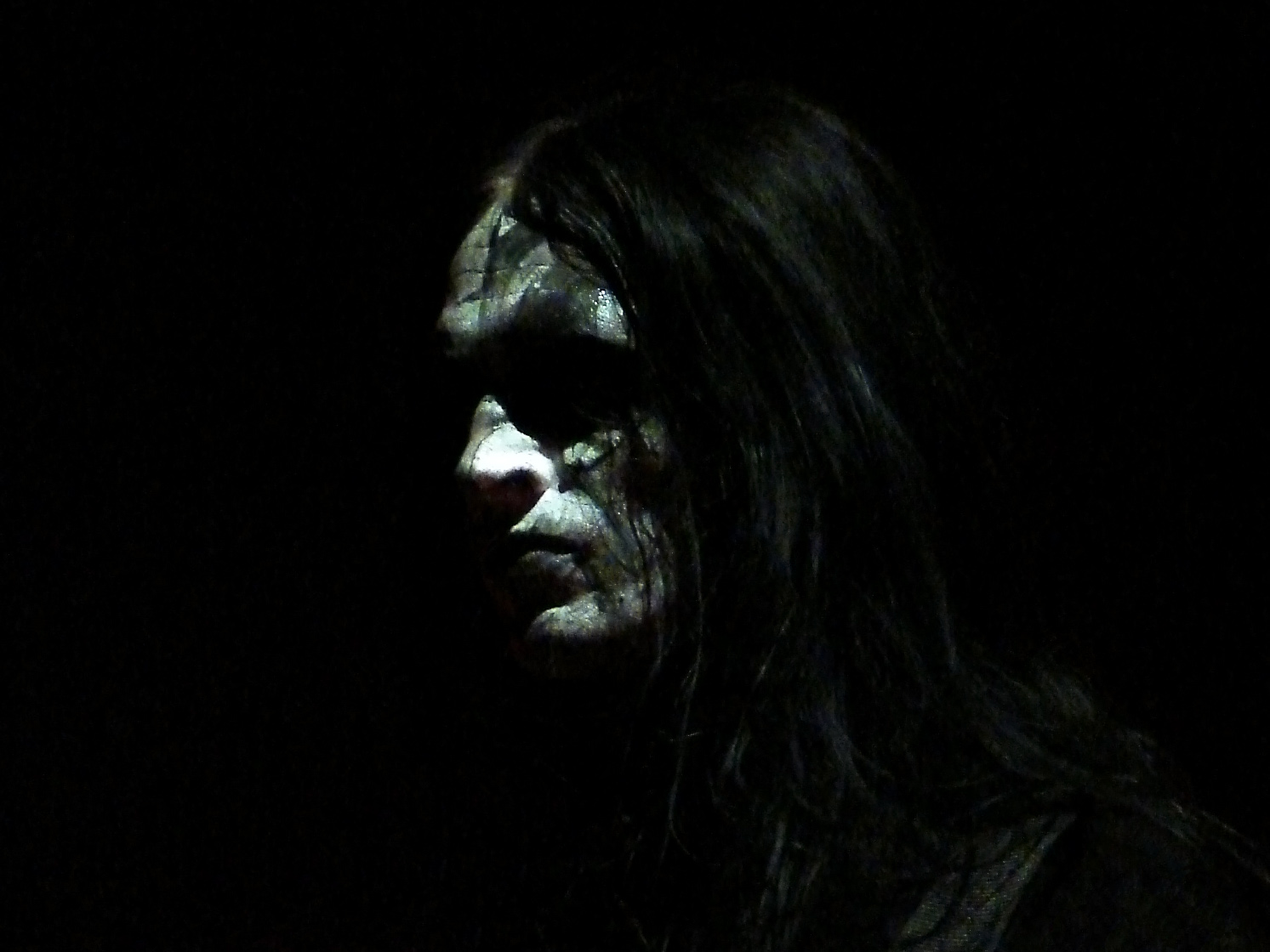 God Seed au Hellfest 2009: King.